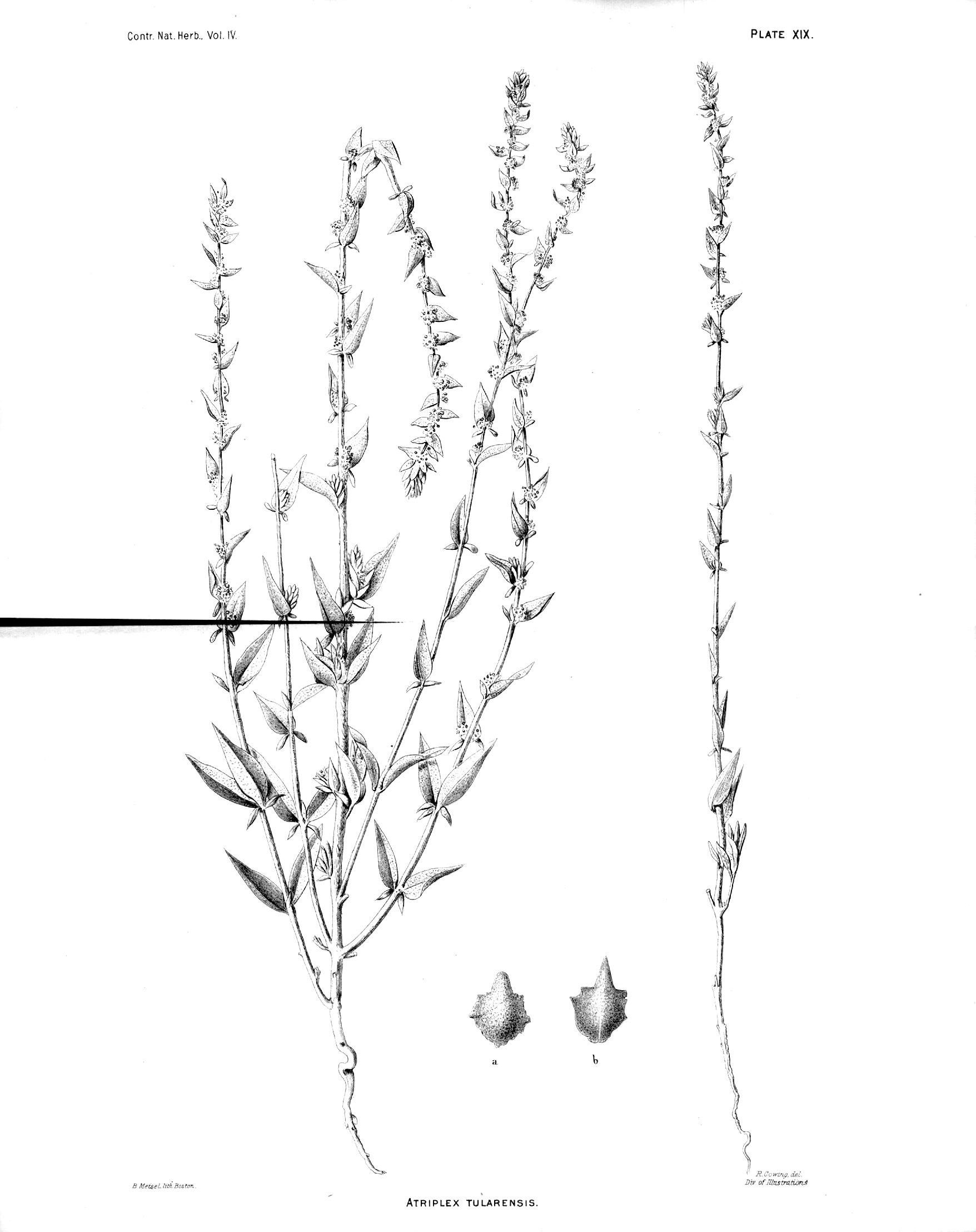 Atriplex tularensis Coville